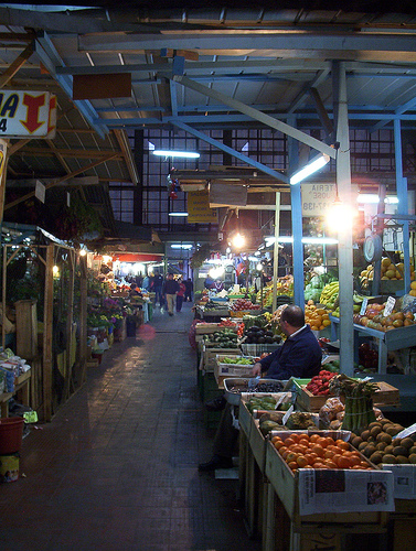 Interior de la Mercado Central, Concepción, Chile.